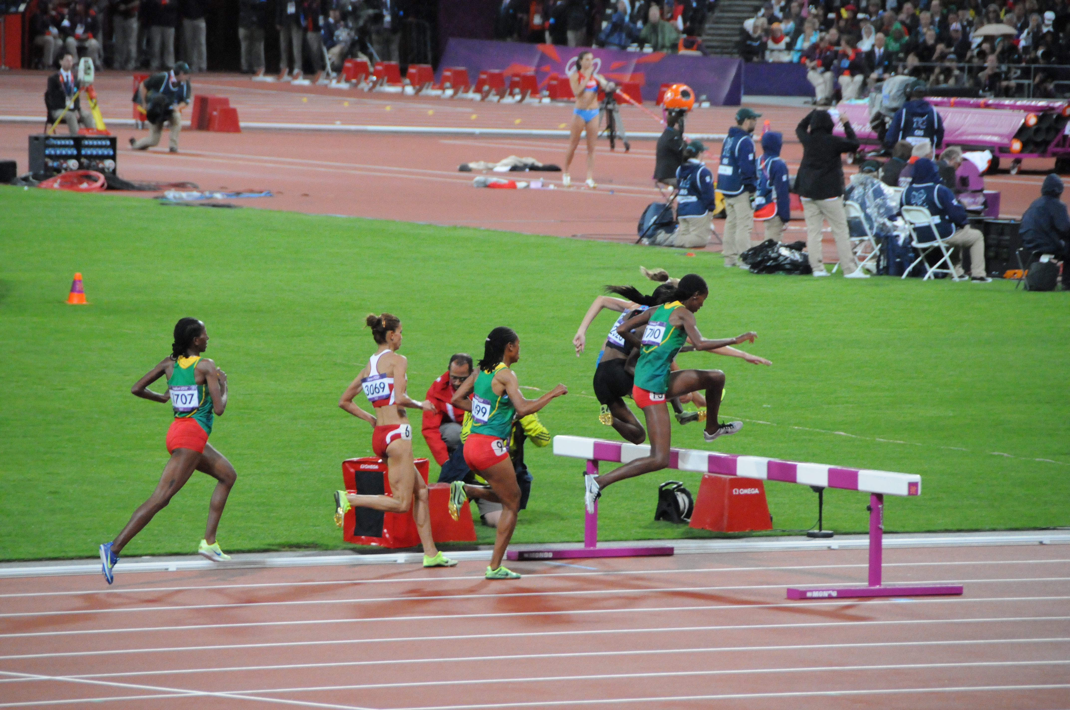 Habiba Ghribi lors du 3000m steeple au JO de Londres. Etenesh Diro, Habiba Ghribi, Sofia Assefa, Hiwot Ayalew